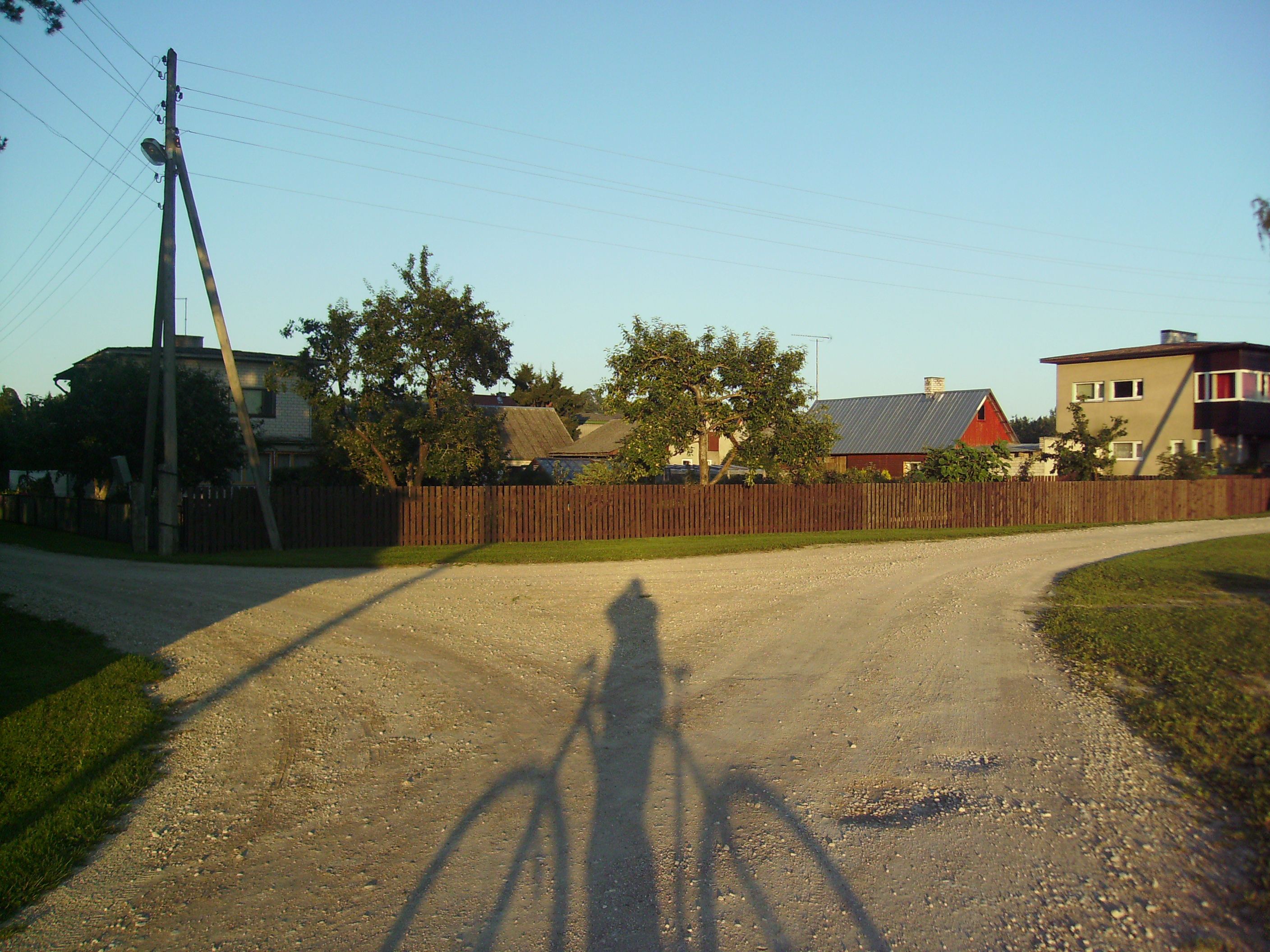 Masti küla.